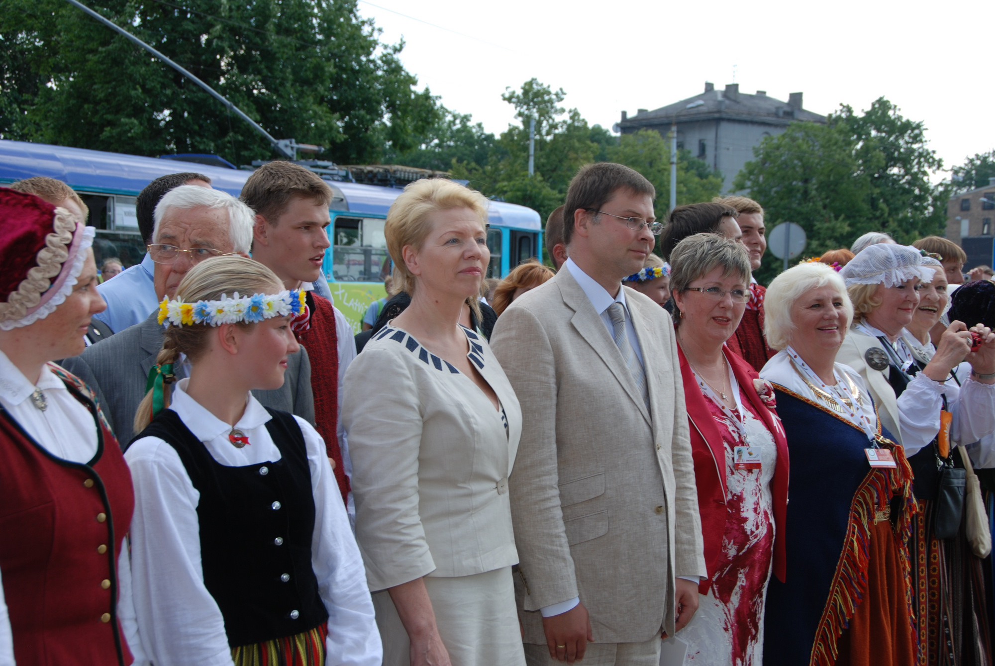 Centrā (no kreisās): izglītības un zinātnes ministre Tatjana Koķe, Ministru prezidents Valdis Dombrovskis, X Latvijas skolu jaunatnes dziesmu un deju svētku izpilddirektore, Valsts izglītības satura centra vadītāja vietniece Agra Bērziņa